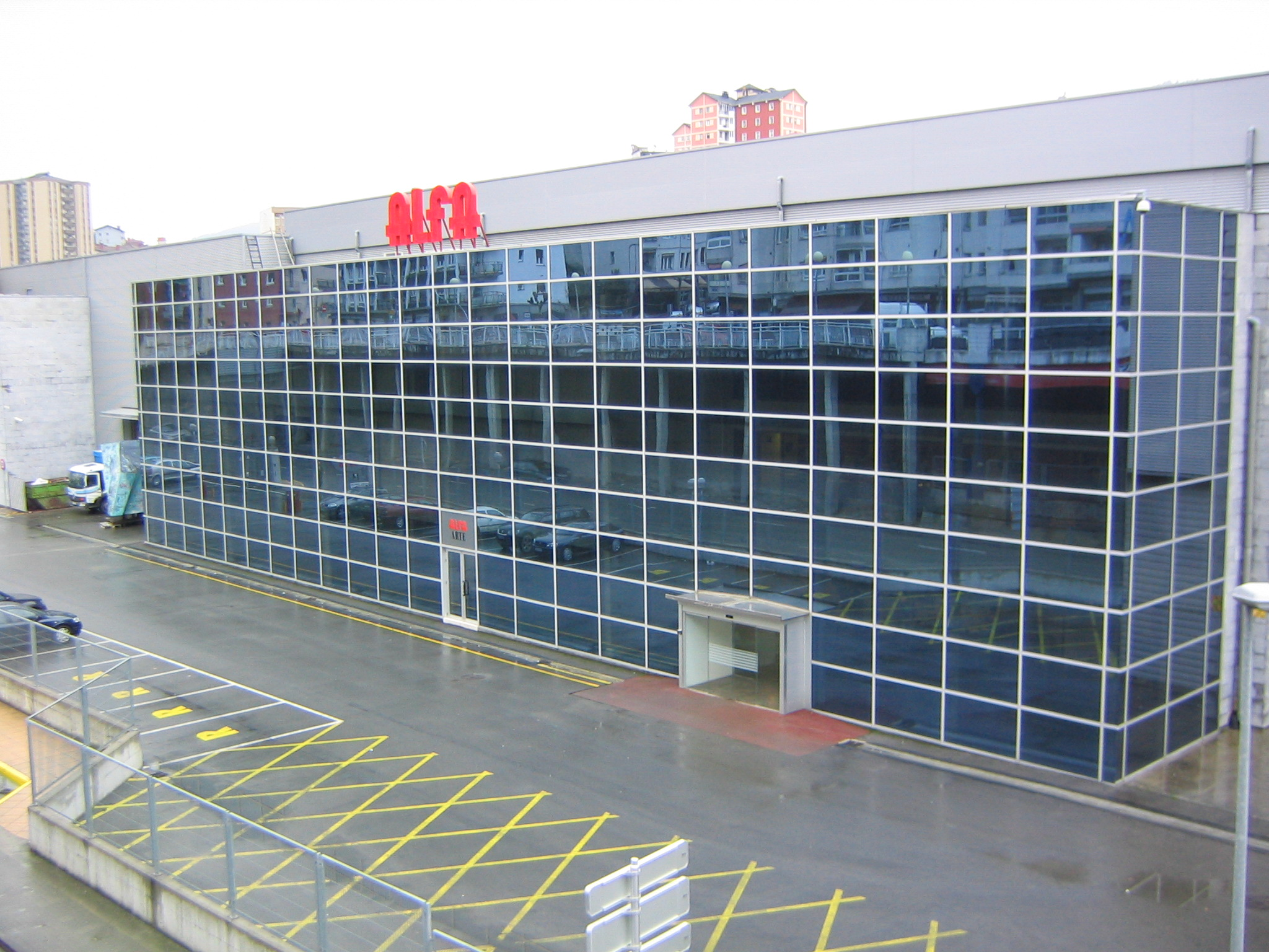 Fachada principal de Alfa en Eibar (guipúzcoa) País Vasco (España).